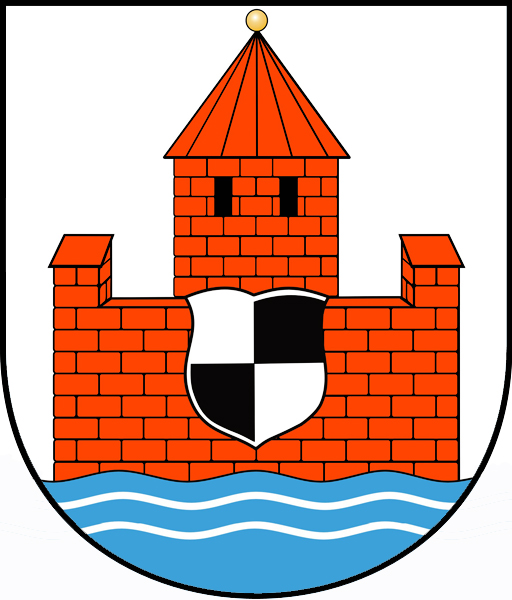 герб Советска